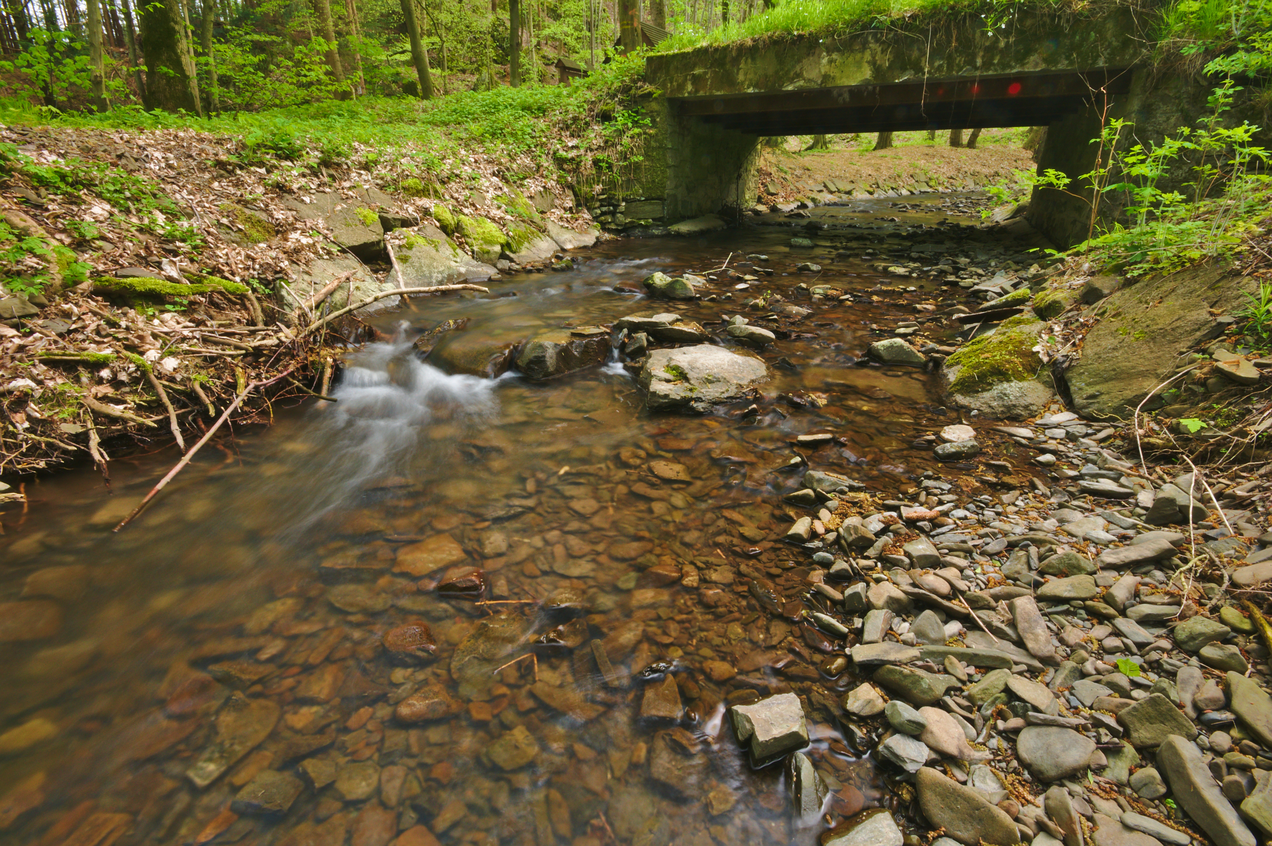 Repešský potok před soutokem s Hloučelou, vojenský újezd Březina, okres Vyškov